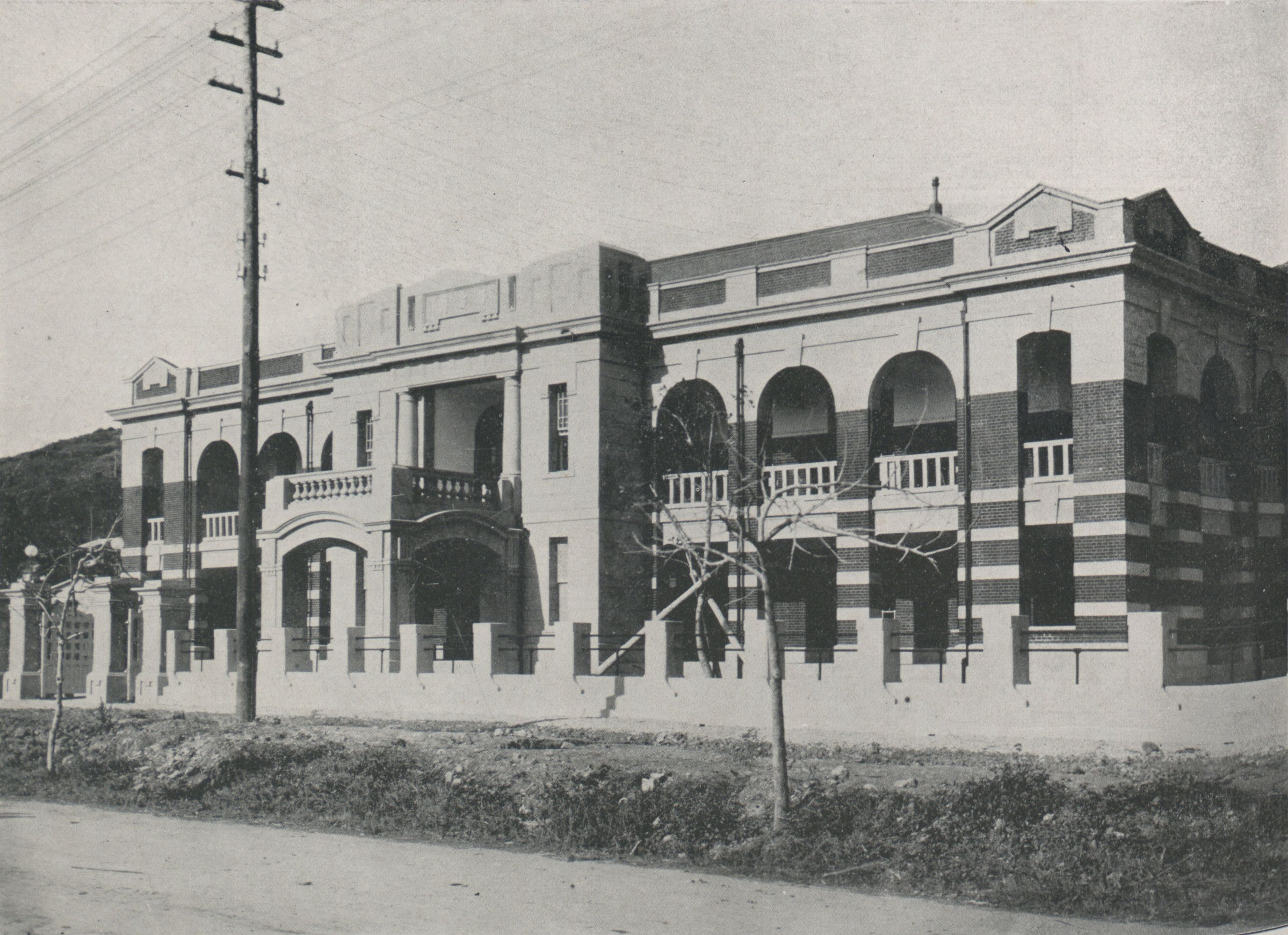 中文（台灣）: 高雄公會堂 (打狗公館)